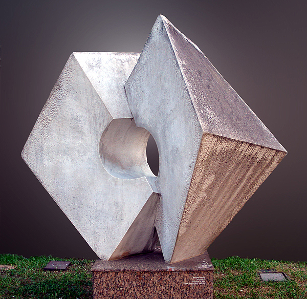 Escultura em mármore de Bruno Giorgi, intitulada "Teorema", 1987-88. Instalada na Praça da Alfândega, defronte ao BANRISUL. Porto Alegre, Brasil. Fundo editado.